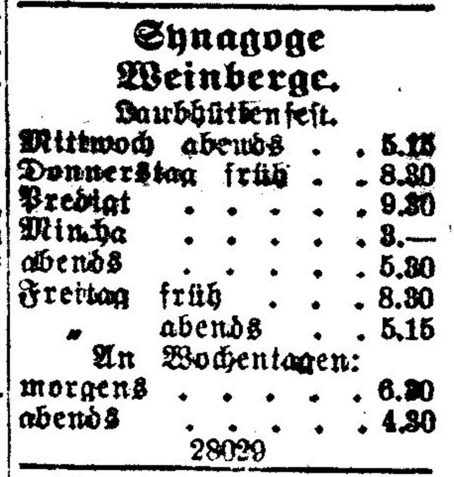 Synagoga vinohrady zmanim 1916